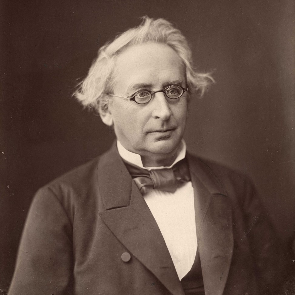 Christian Selmer (1816–1889), sakfører, byfogd i Drammen og statsminister (H).